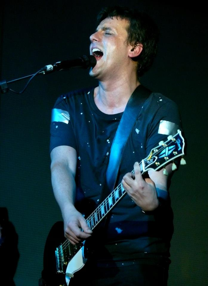 irreversible tour 2012